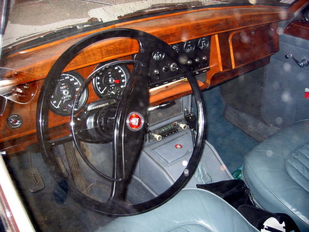 Jaguar MK2